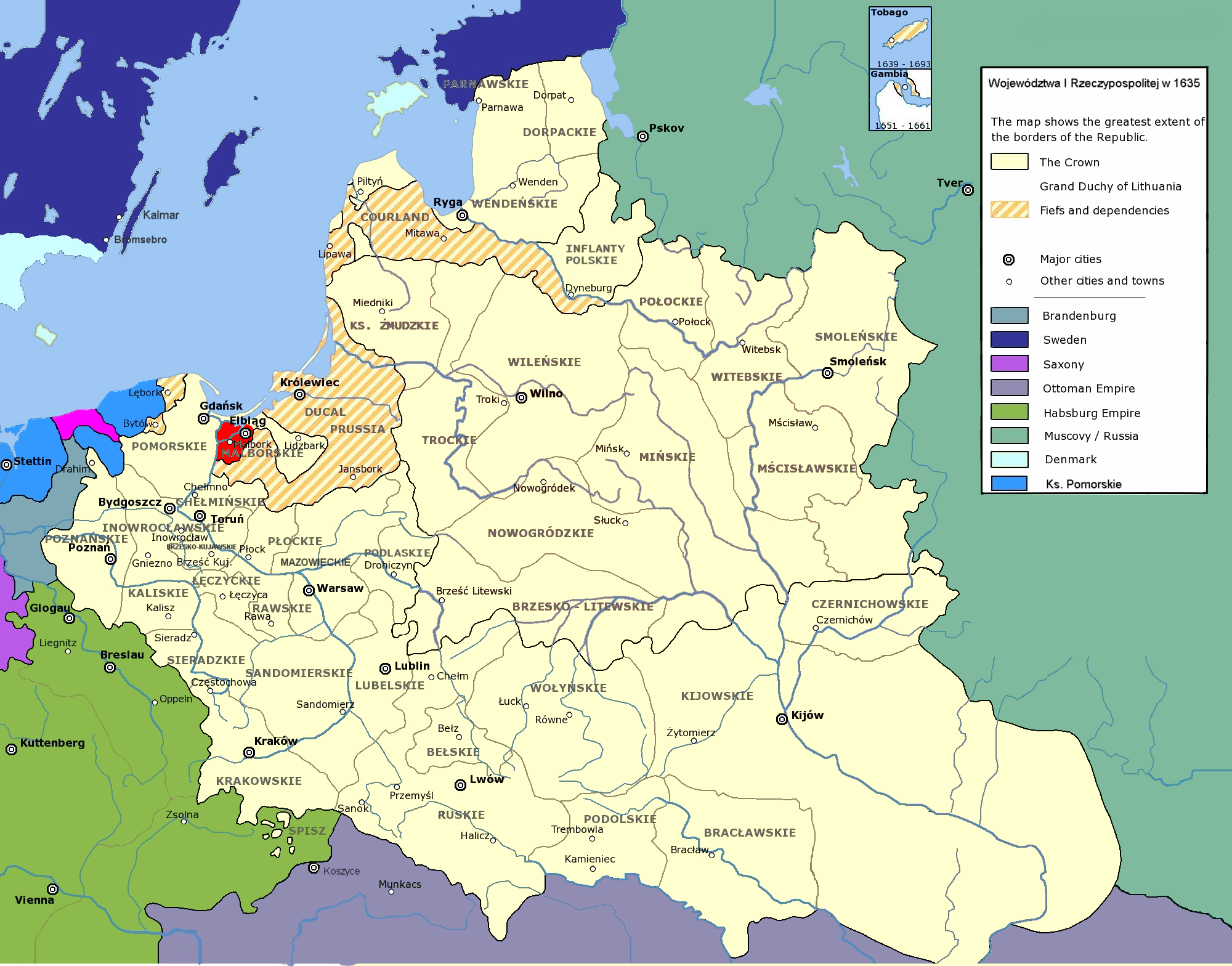 Rzeczpospolita Obojga Narodów w 1635 r.; województwo malborskie Polish-Lithuanian Commonwealth in 1635; Malbork Voivodeship